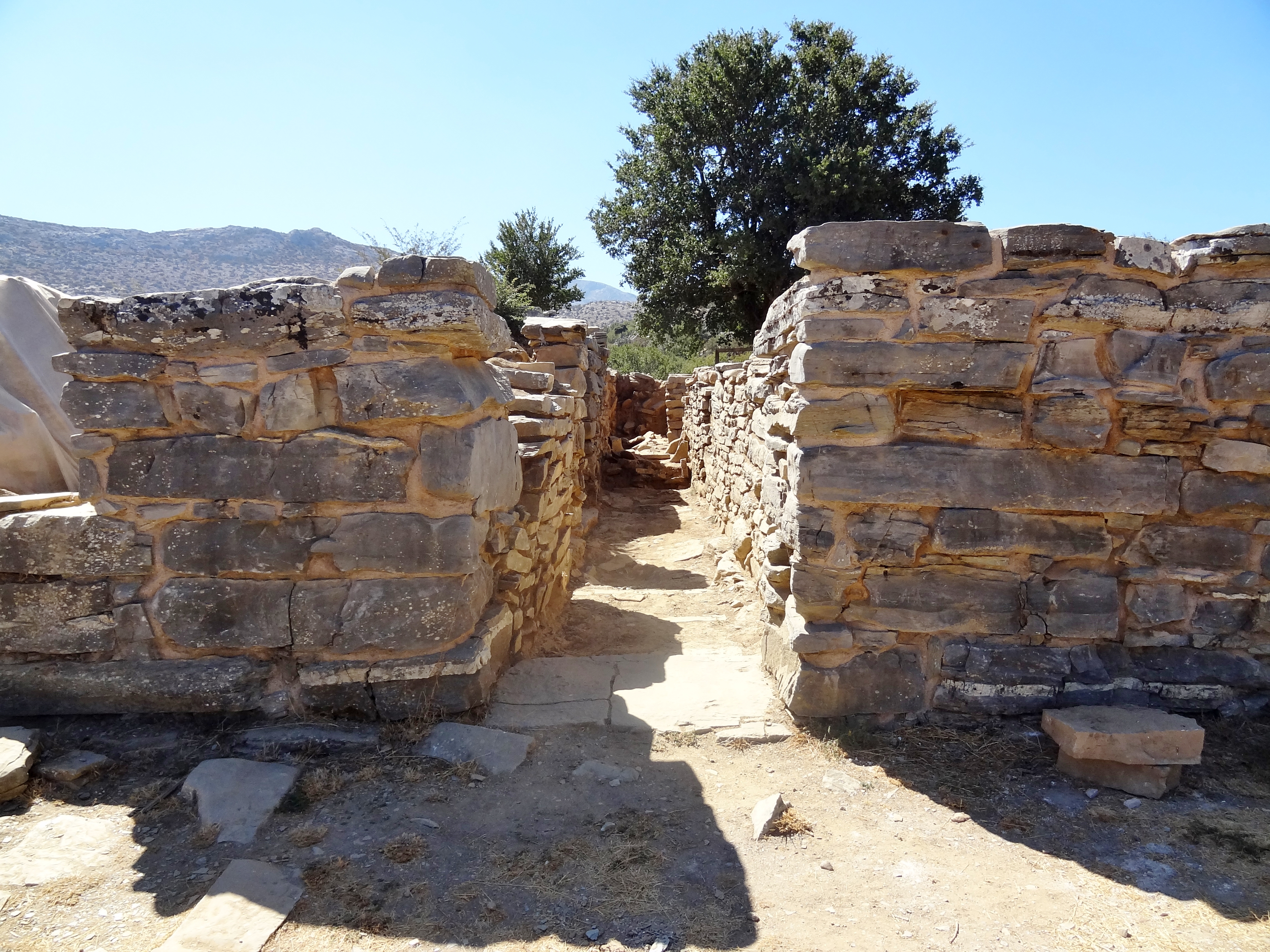 Ausgrabungsstätte von Zominthos, Gemeinde Anogia, Kreta, Griechenland